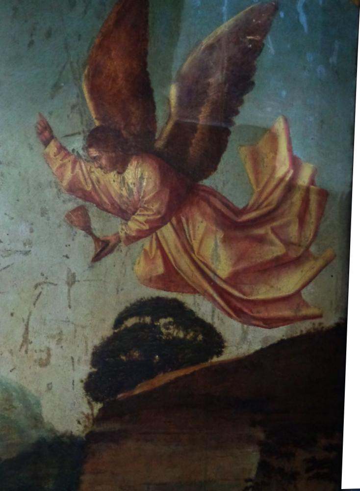 Trabalho de restauro do Laboratório José de Figueiredo.